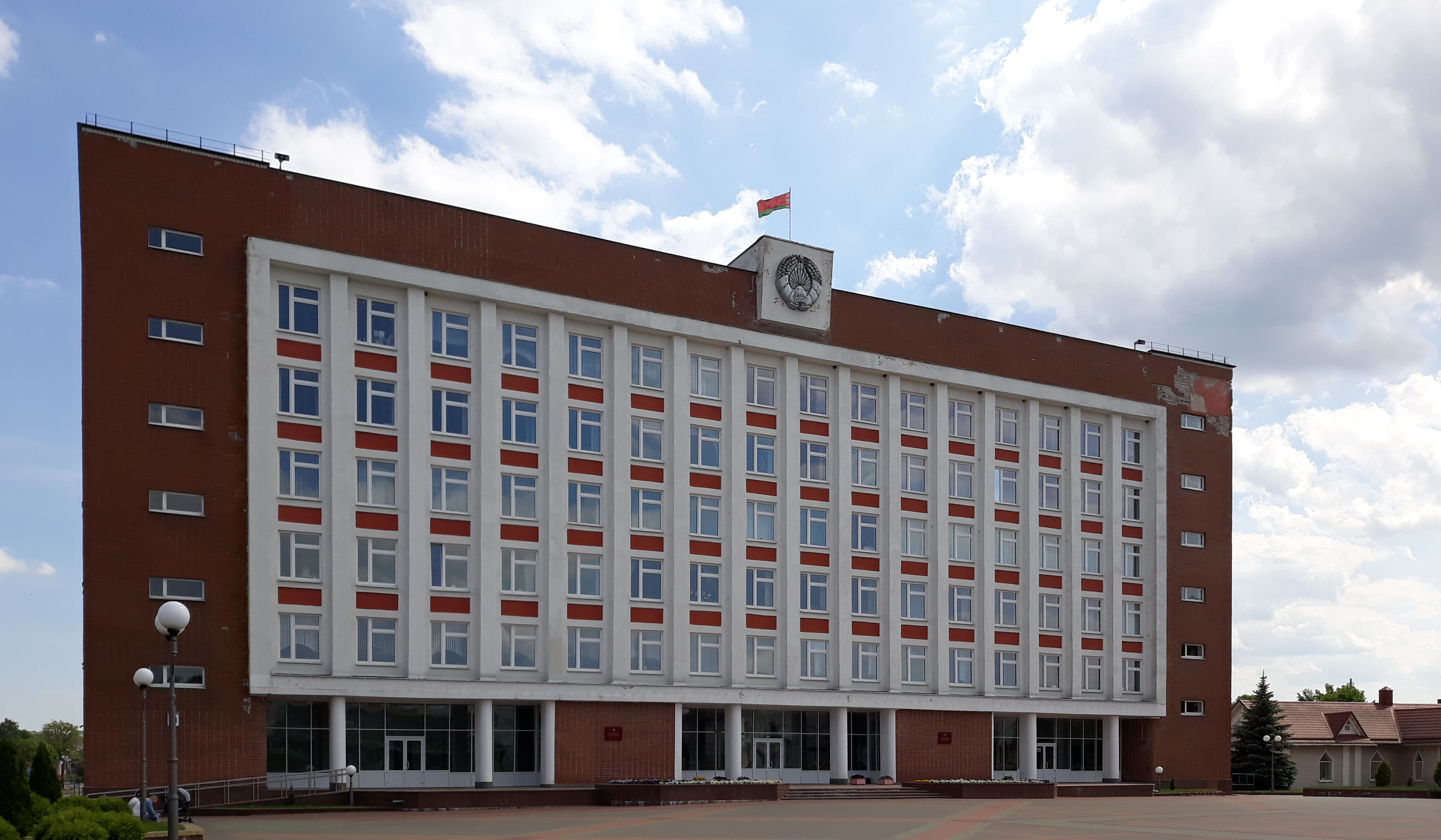 Будынак раённага выканаўчага камітэта ў г. Ашмяны